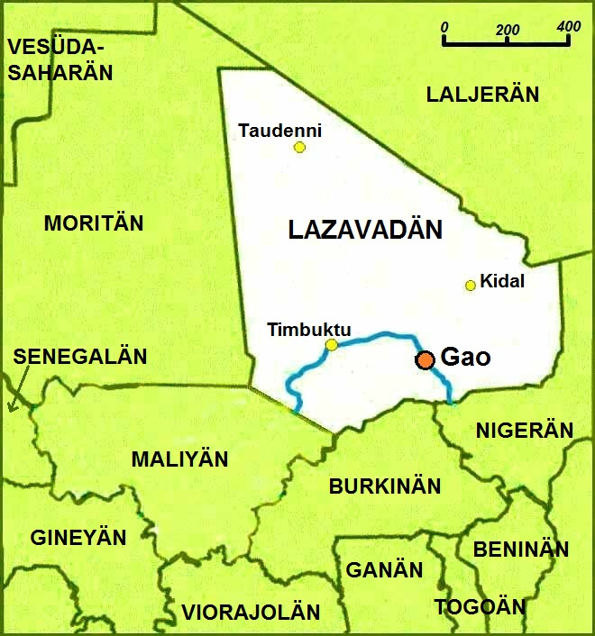 Volapük: Kaed Lazavadanän